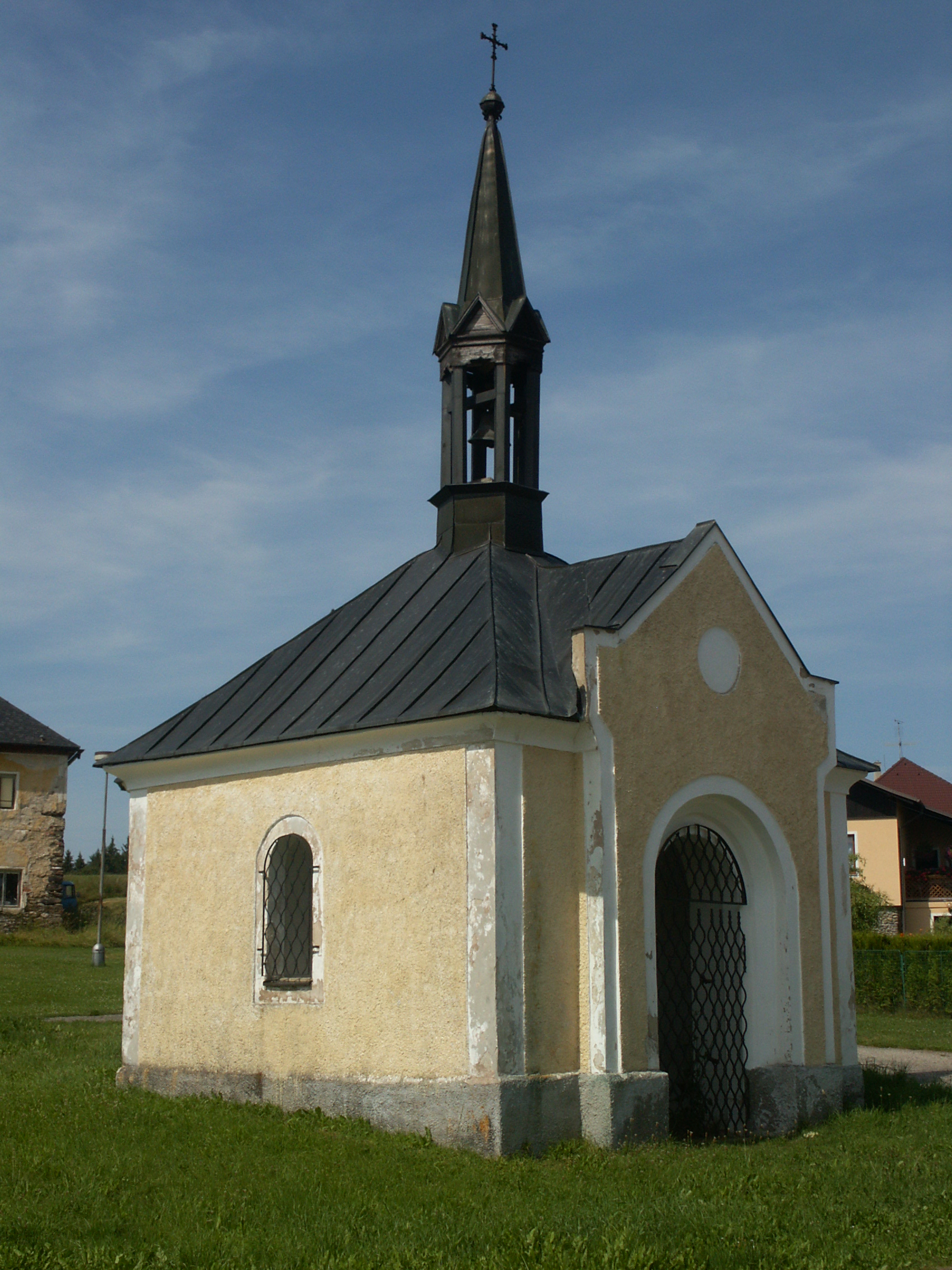 Milná - kaple